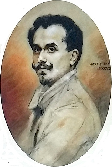 Autoportrait de Georges A. L. Boisselier à l'âge de 36 ans